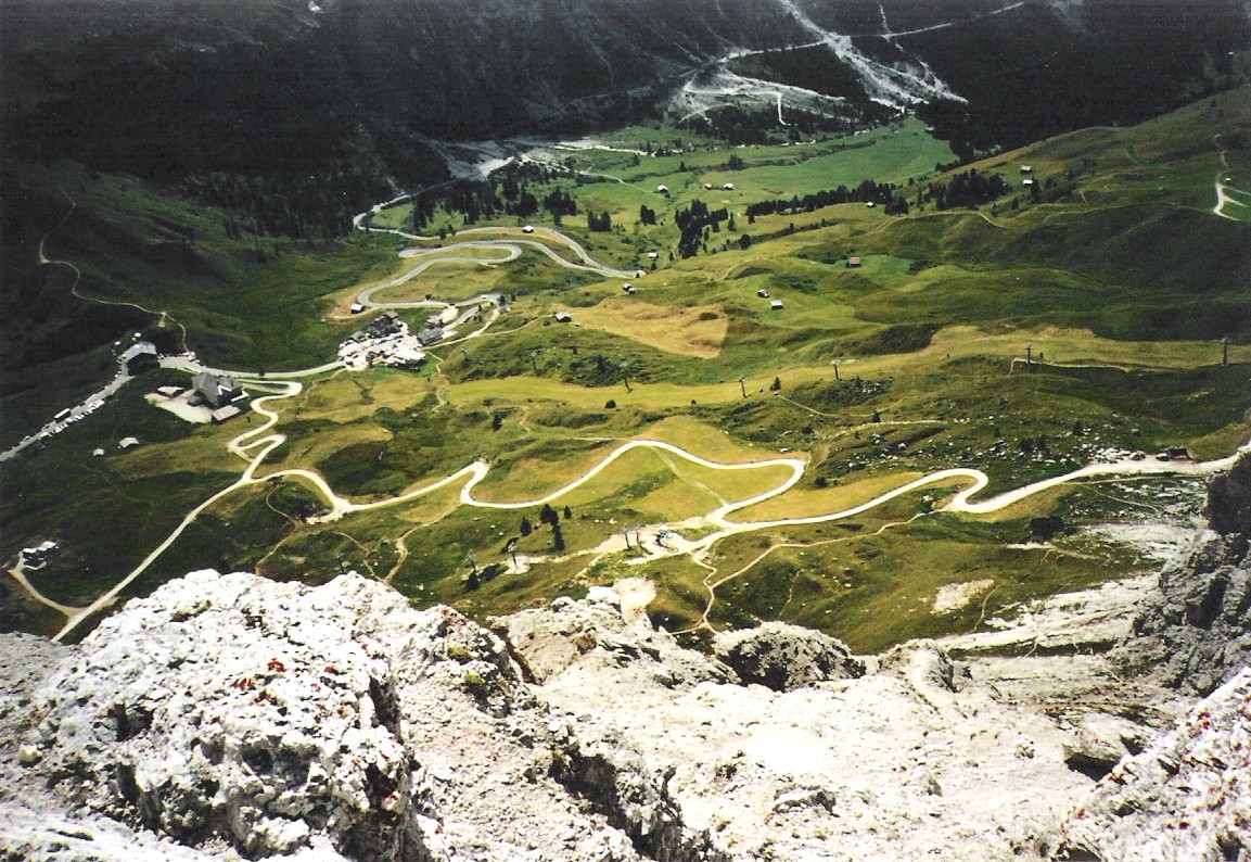 Das Bild zeigt das Grödnerjoch von der Großen Cirspitze aus.